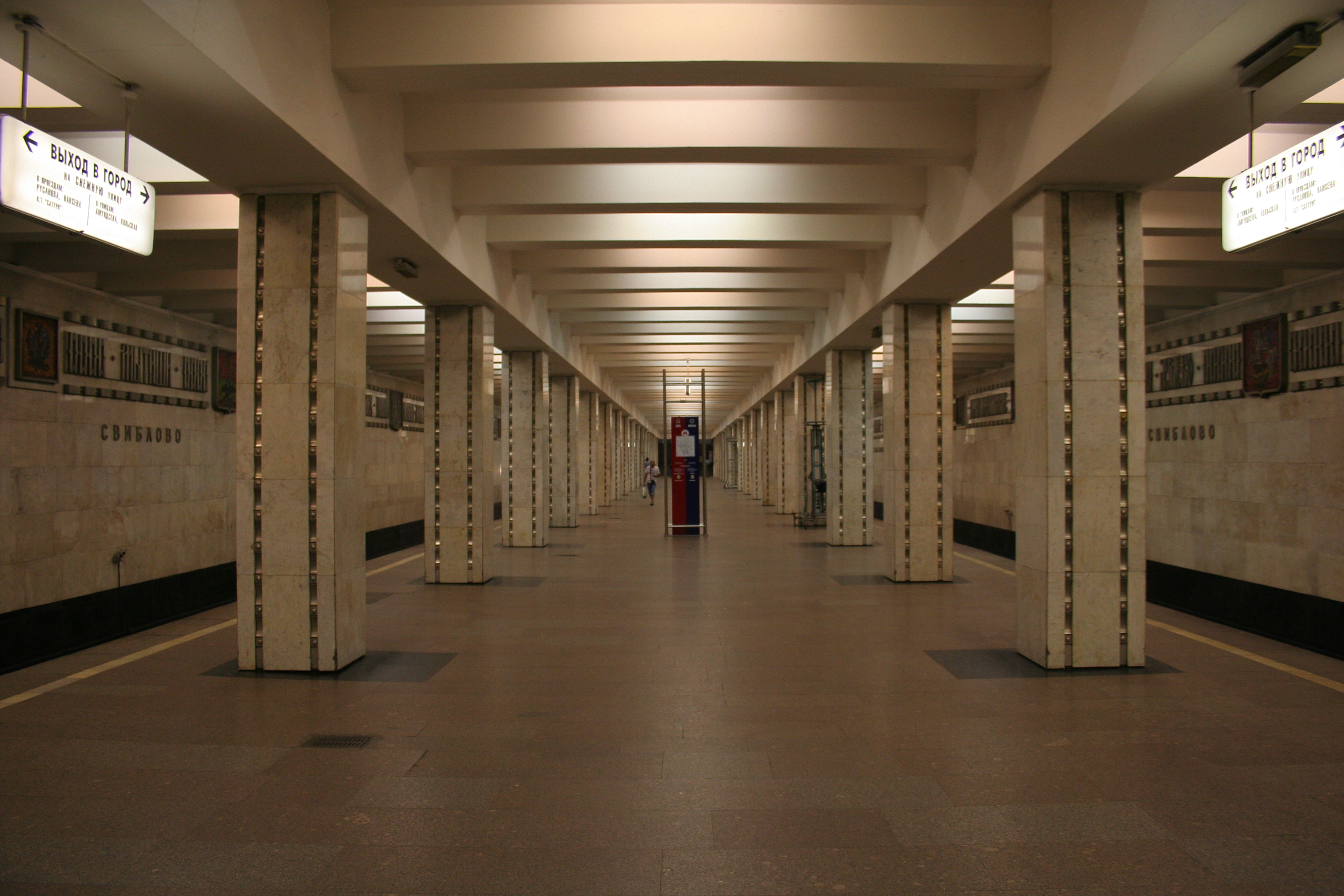 U-Bahnhof Swiblowo der Metro Moskau.